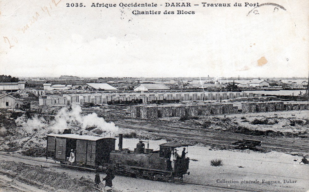 Une 030 T manoeuvre à Dakar